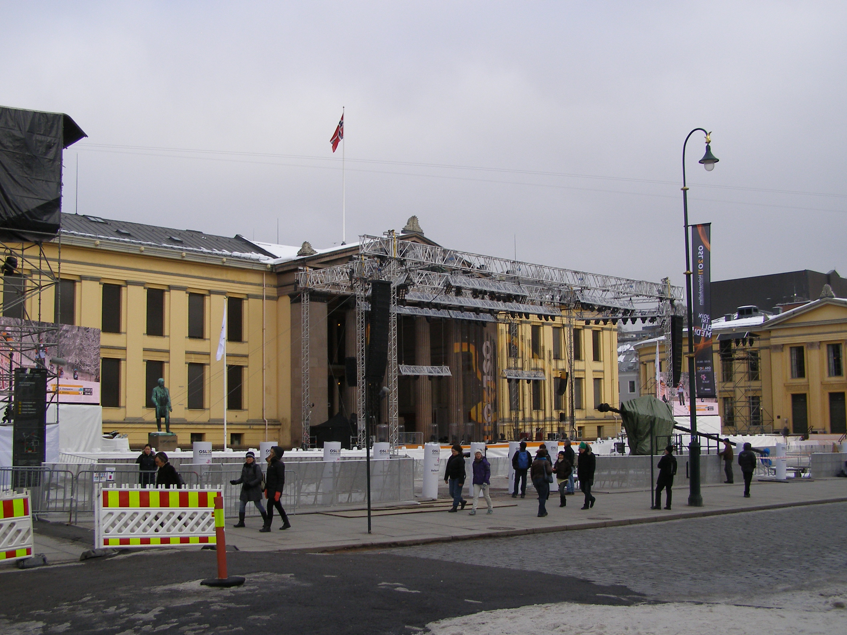 オスロ市中心部、オスロ大学前広場に設置されたメダルセレモニー会場